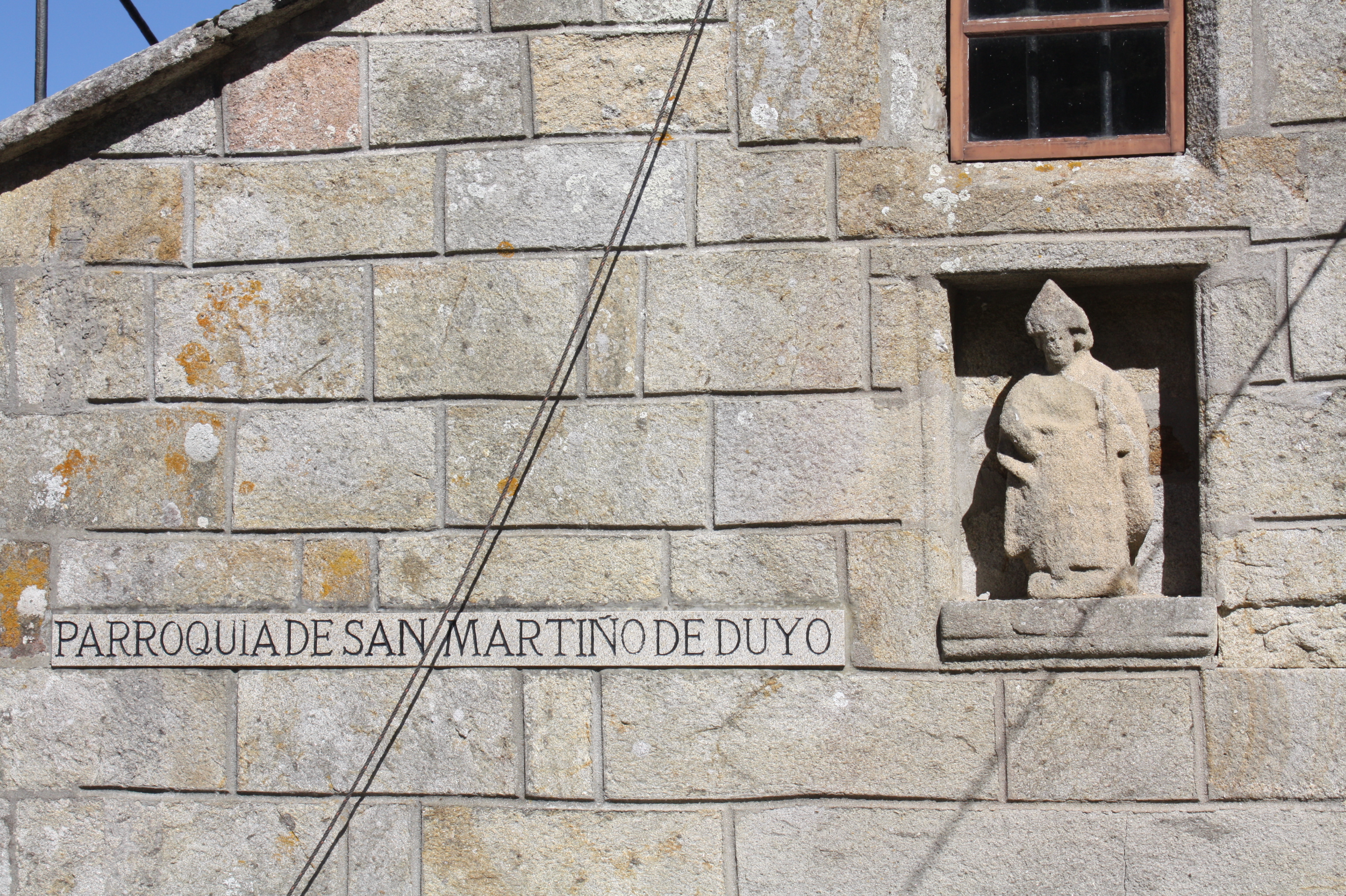 Figura de San Martiño na fachada da igrexa do mesmo nome, en San Martiño de Duio (Fisterra, A Coruña)